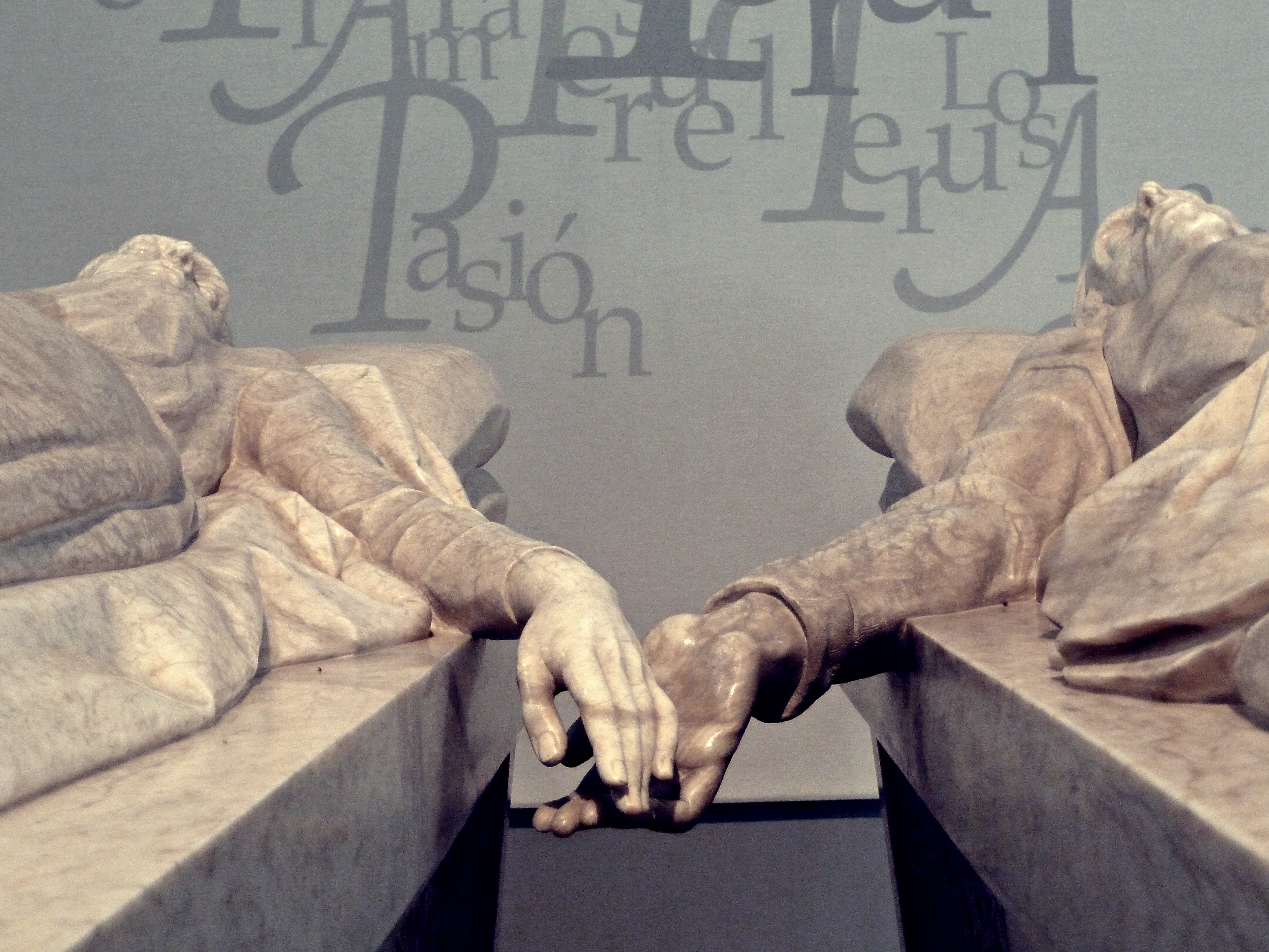 Mausoleo de los Amantes de Teruel, junto a la Iglesia de San Pedro en Teruel (Spain)